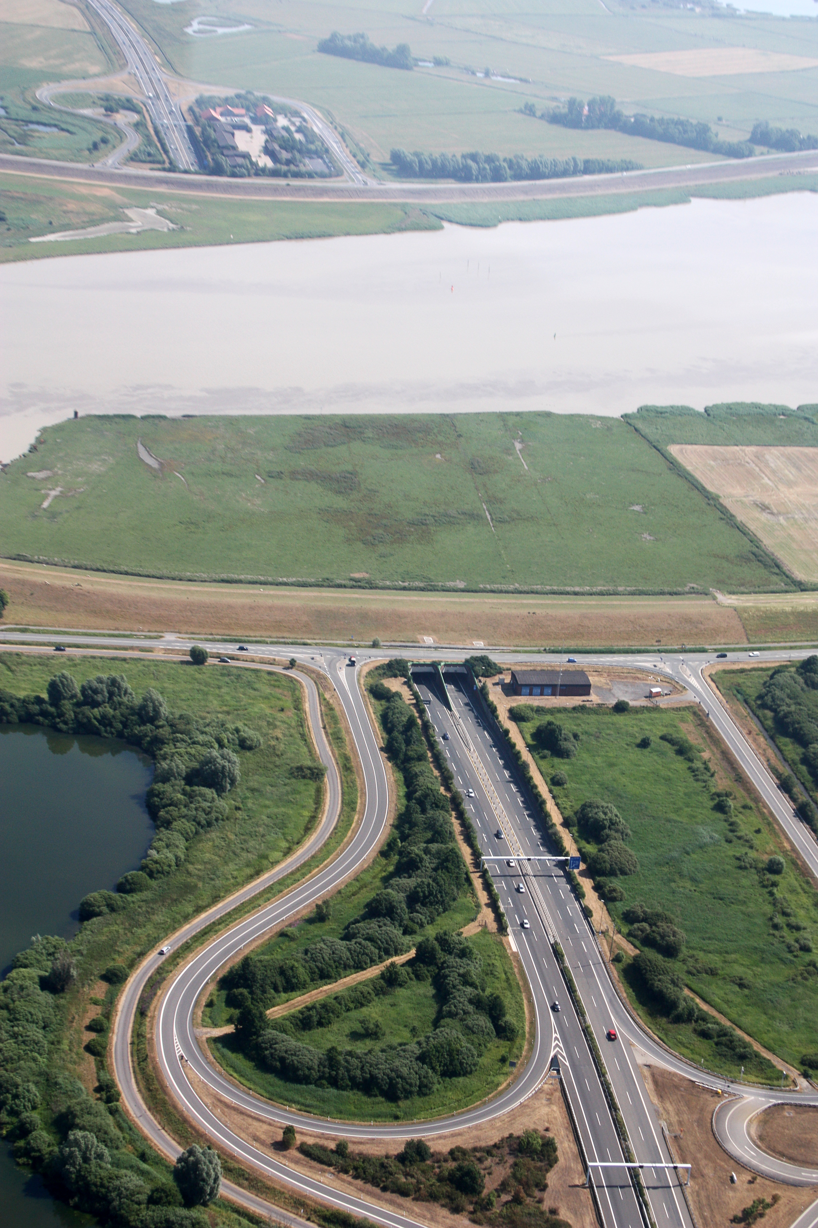 Luftaufnahme Emstunnel; Flug von Leer nach Emden; Flughöhe 1500 ft; Juli 2010; Originalfoto bearbeitet: Tonwertkorrektur und Bild geschärft mit Hochpassfilter